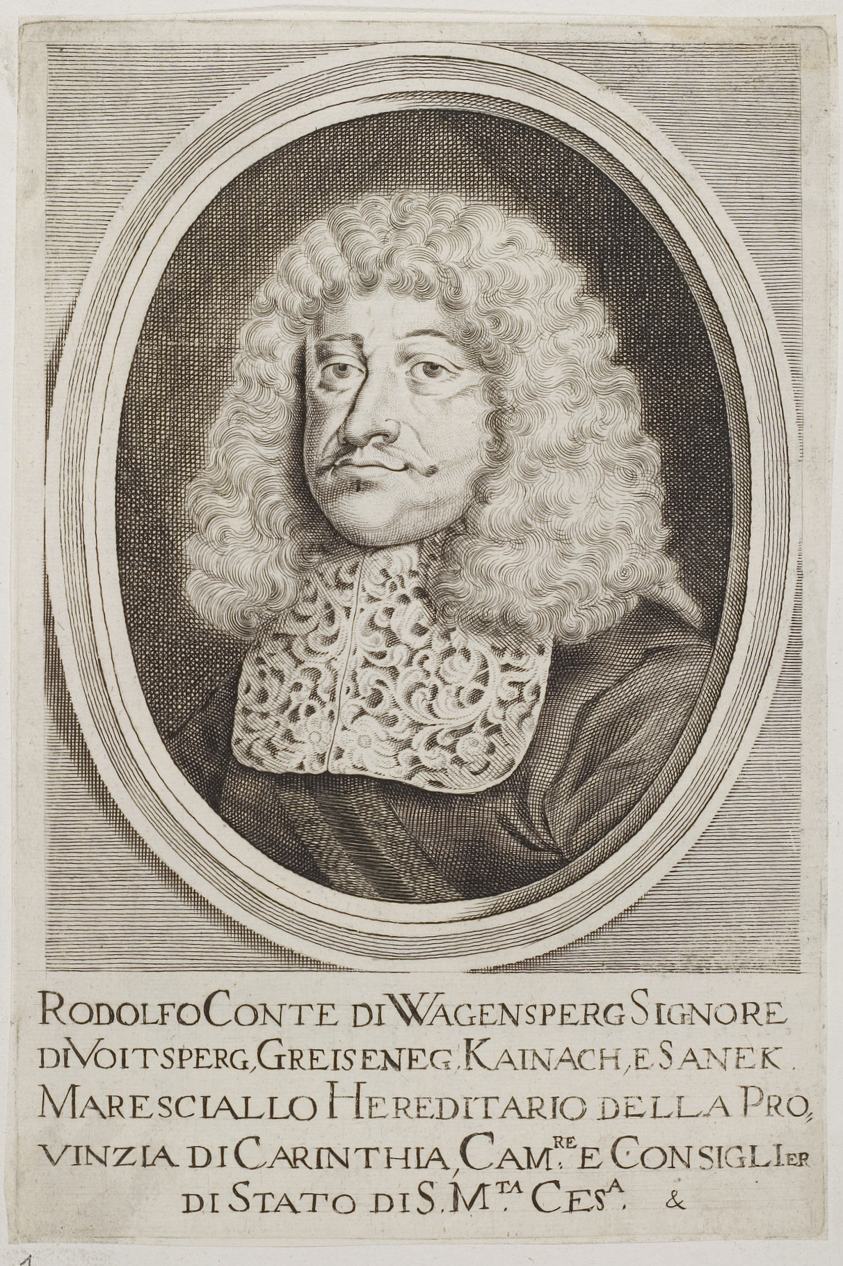 Grafik aus dem Klebeband Nr. 2 der Fürstlich Waldeckschen Hofbibliothek Arolsen Motiv: Johann Rudolf von Wagensperg (1613–1679), Erbmarschall von Kärnten